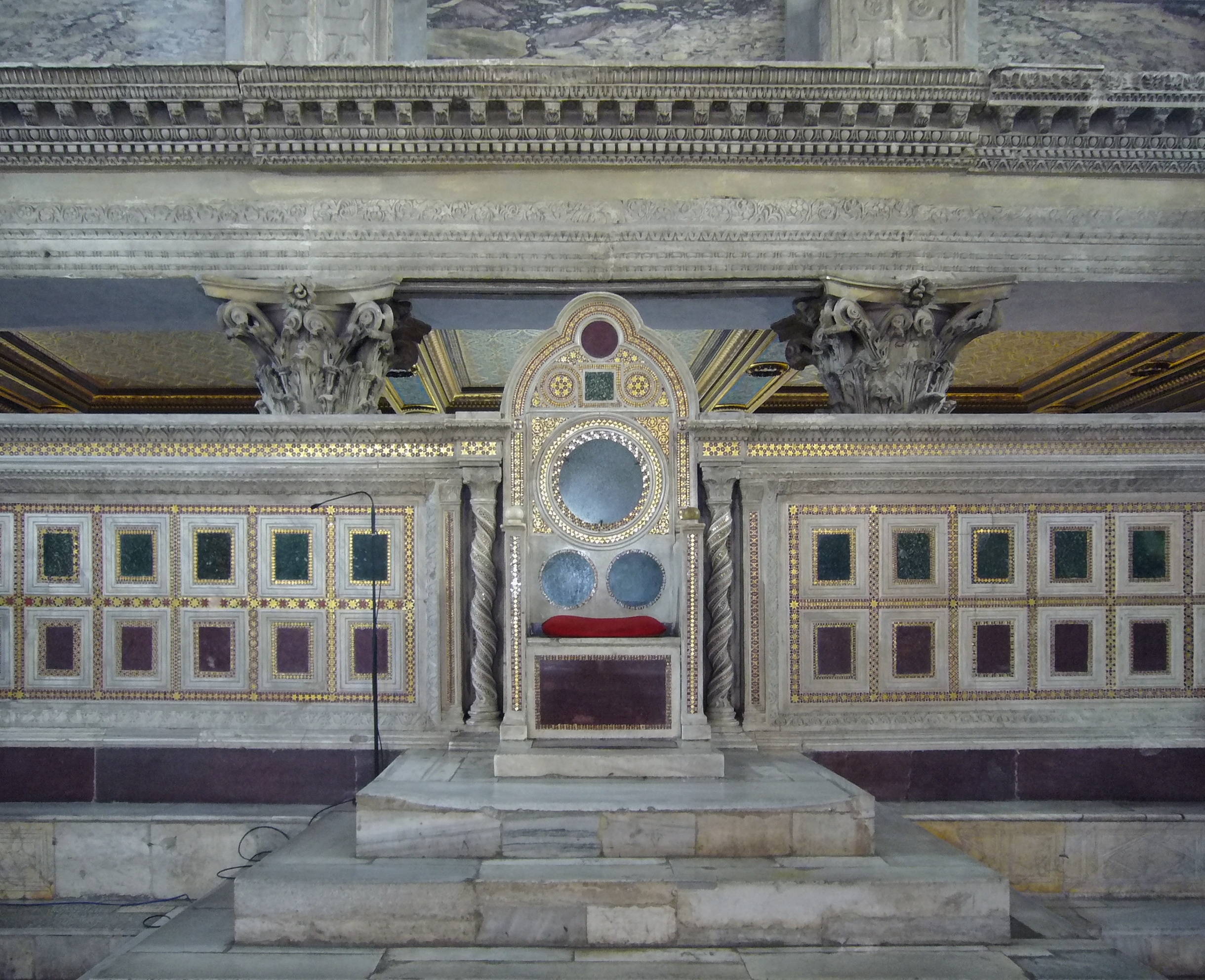 Roma, san Lorenzo fuori le mura: trono papale nel presbiterio (XIII sec.)